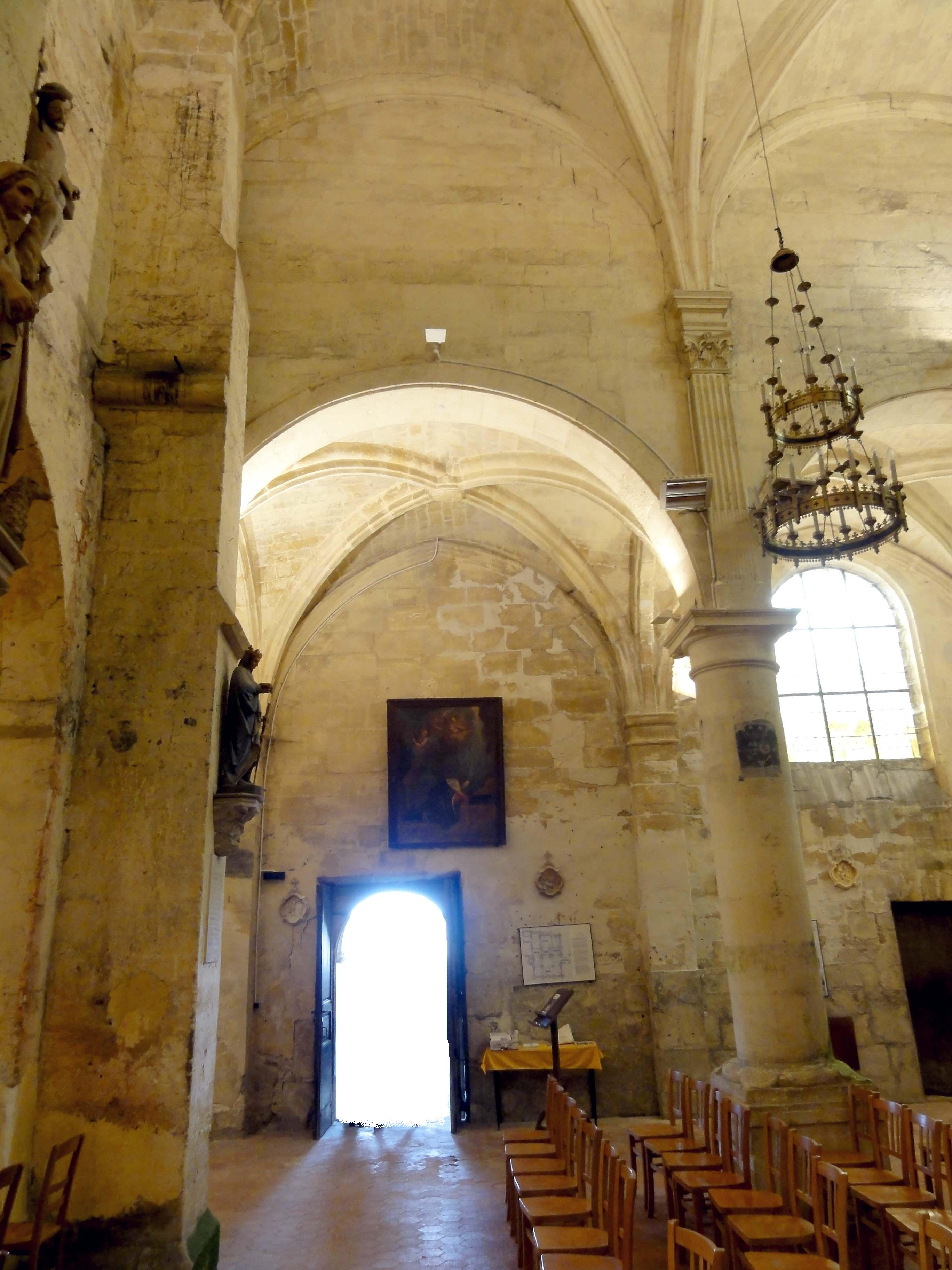 Intérieur de l'église (voir titre).